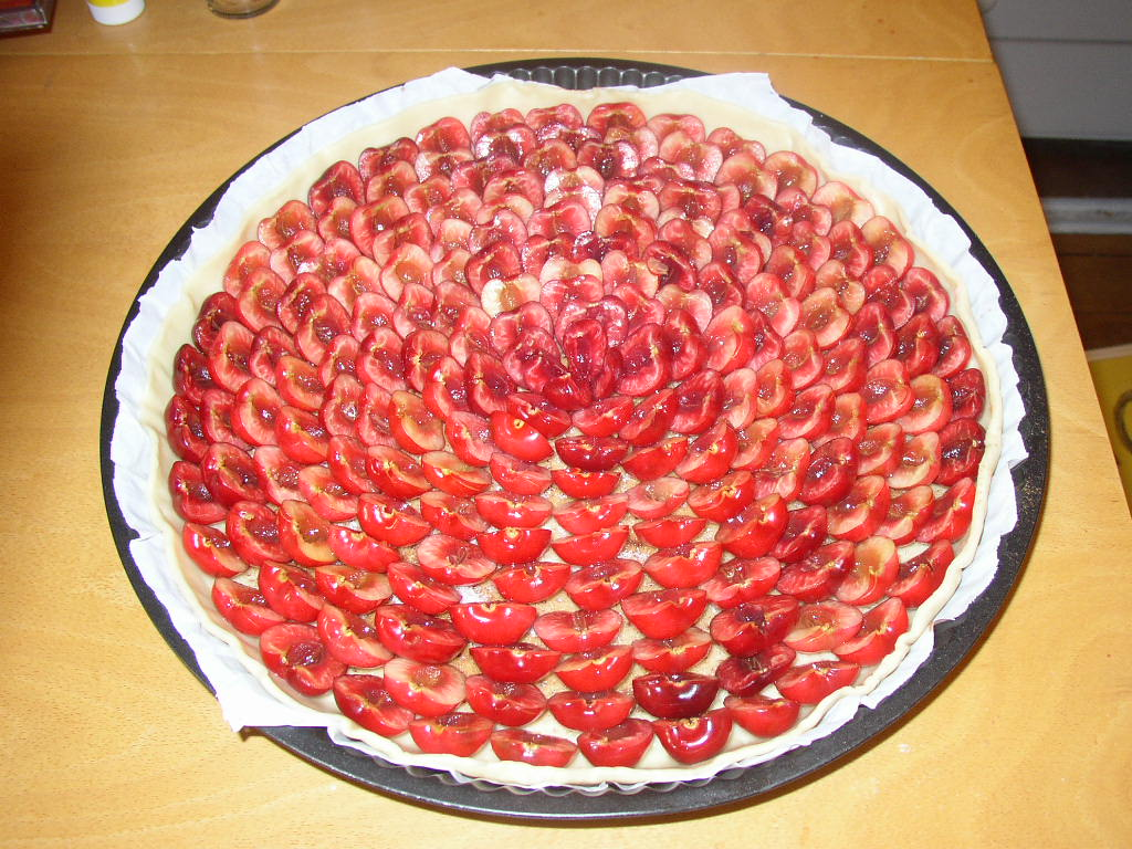 Tarte aux cerises avant cuisson. Photo prise par Sam Hocevar.